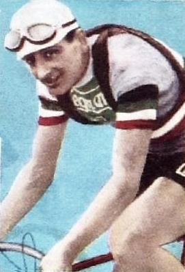 Alfredo Binda - Campioni dello Sport 1967-1968, n°278